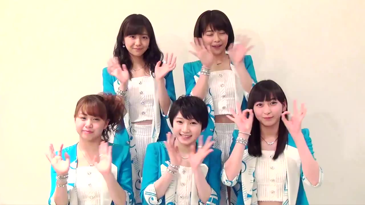 楽遊 vol.43号表紙【Juice=Juice】さんからのコメント！